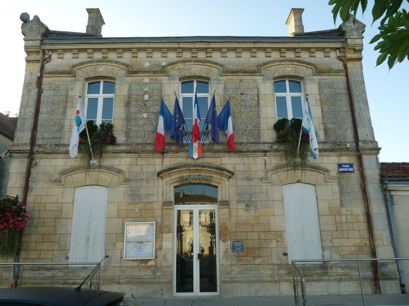 mairie de St-Genis-de-Saintonge (17), France